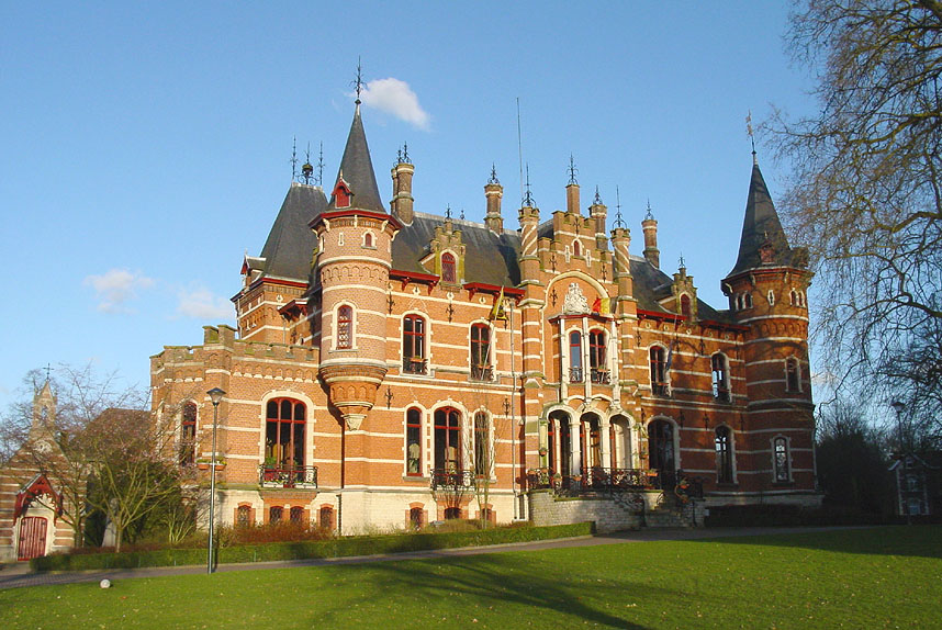 Hoeilaart Gemeentehuis (town hall) in de lente van 2006.